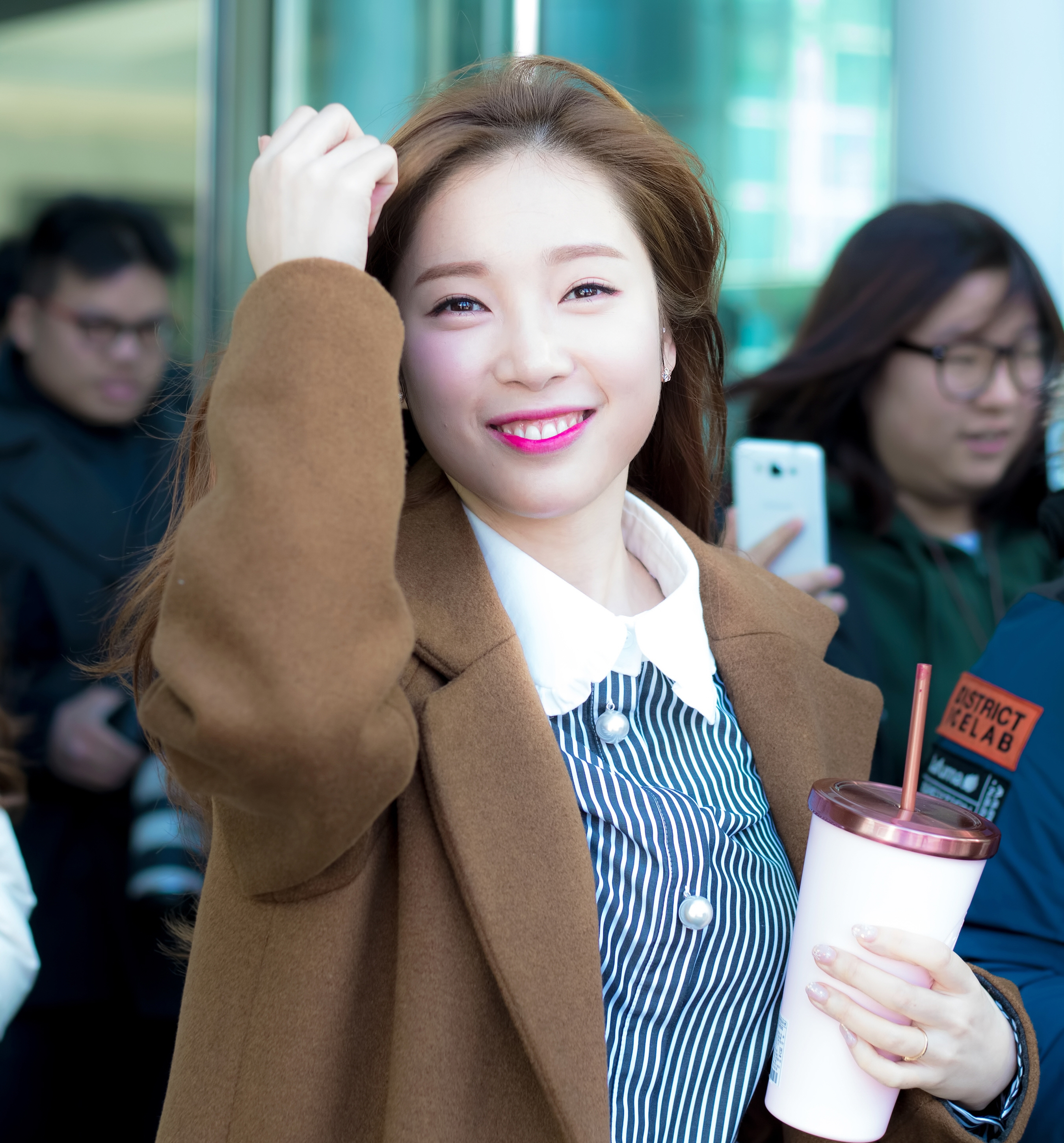 170116 목동 투맨쇼 출퇴근길 윤채경 4Pic